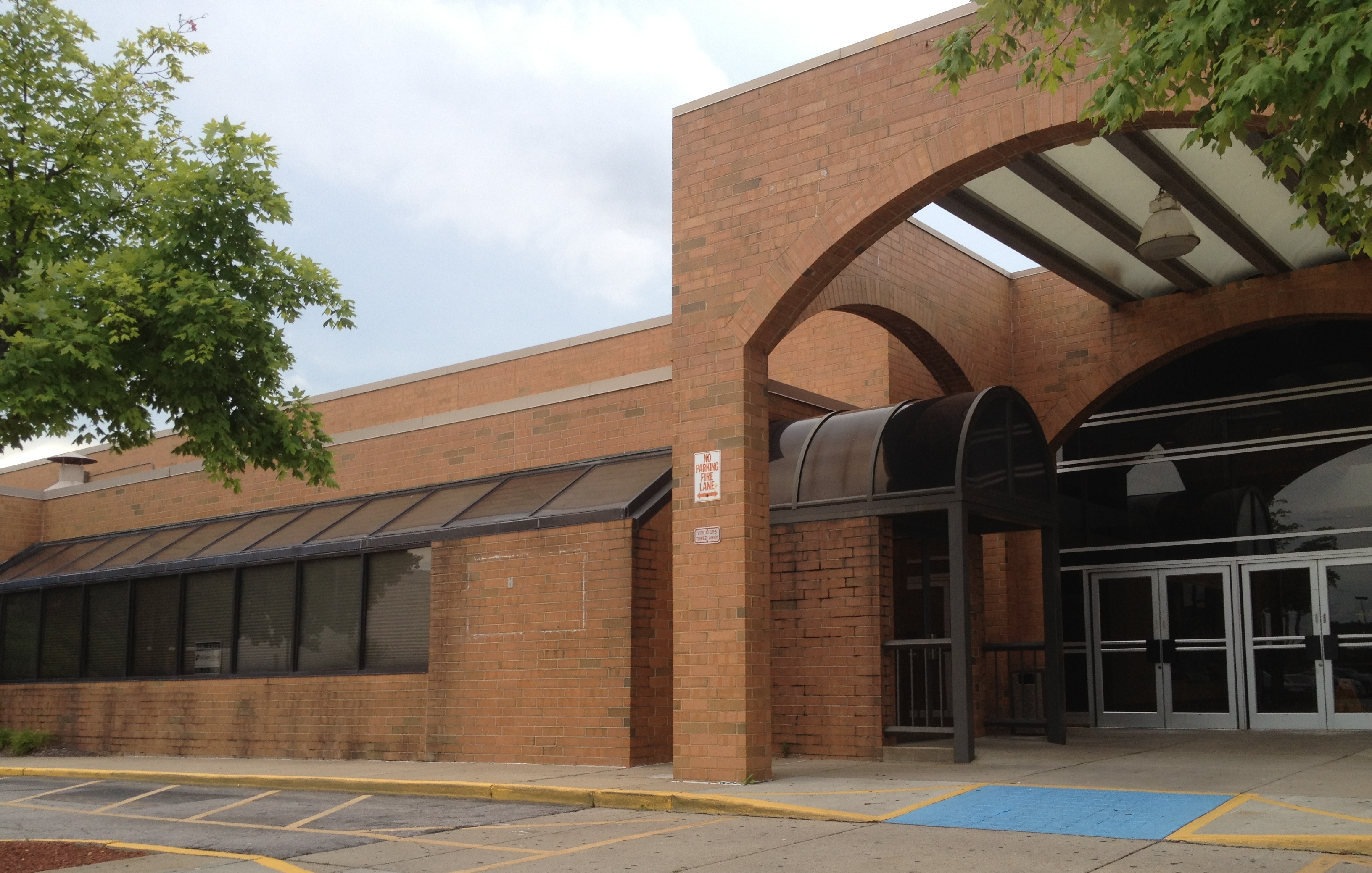 Piedmont Mall Danville, VA